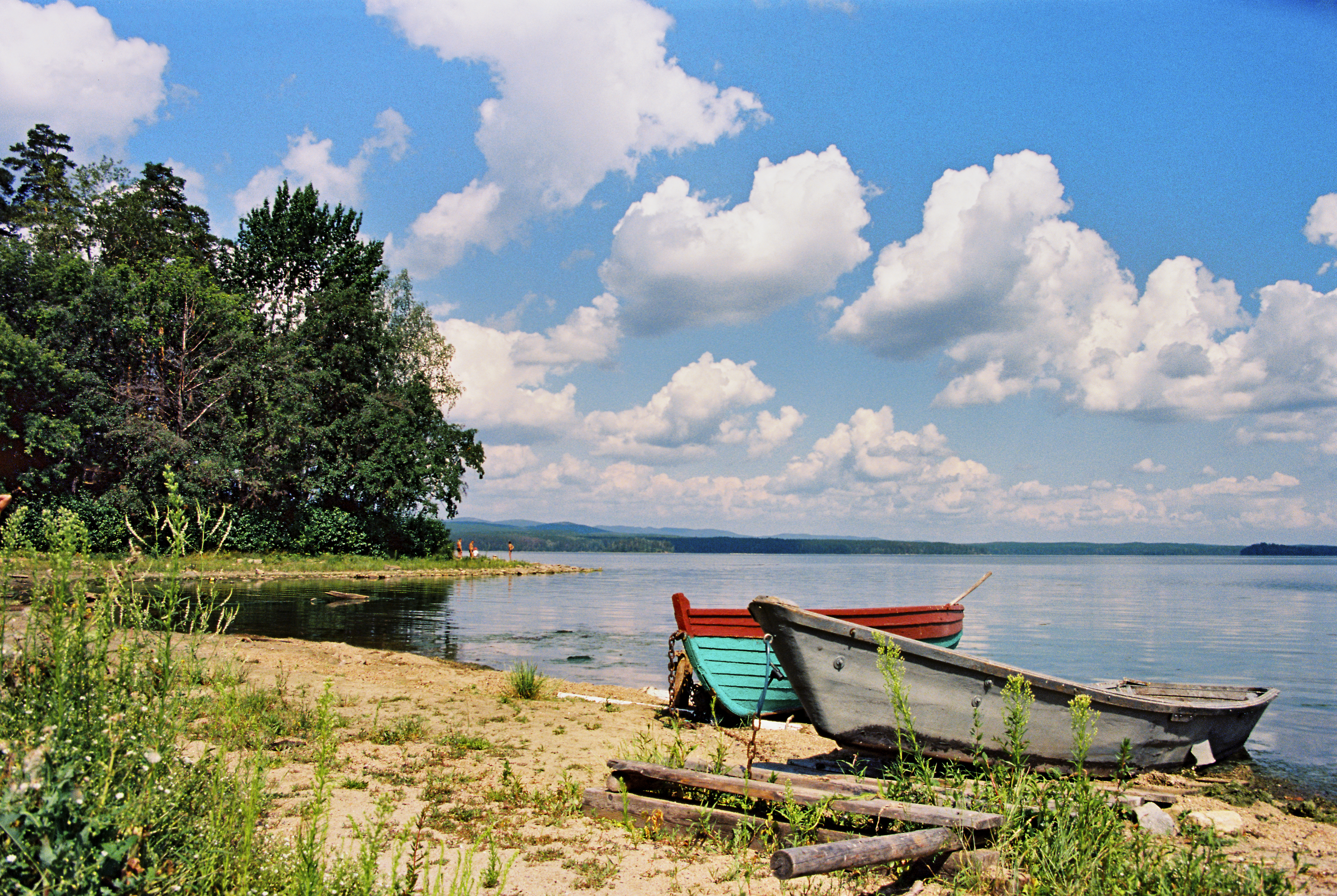 Озеро Большой Кисегач: Чебаркульский район, Челябинская область This image is related to the protected area of Russia number 7410302